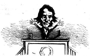 Caricature de Paul Marie Laurent (1793-1877), dit « Laurent de l'Ardèche », par Cham.